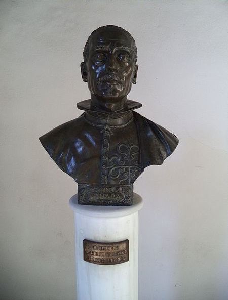 Busto de Miguel de mañara en el zaguán del Hospital de la Caridad